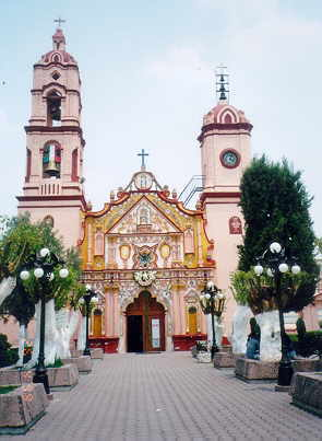 La iglesia de San Miguel Arcángel tiene portada muy lucida de: planta rosa con imágenes góticas, tiene arcos muy ovalados.